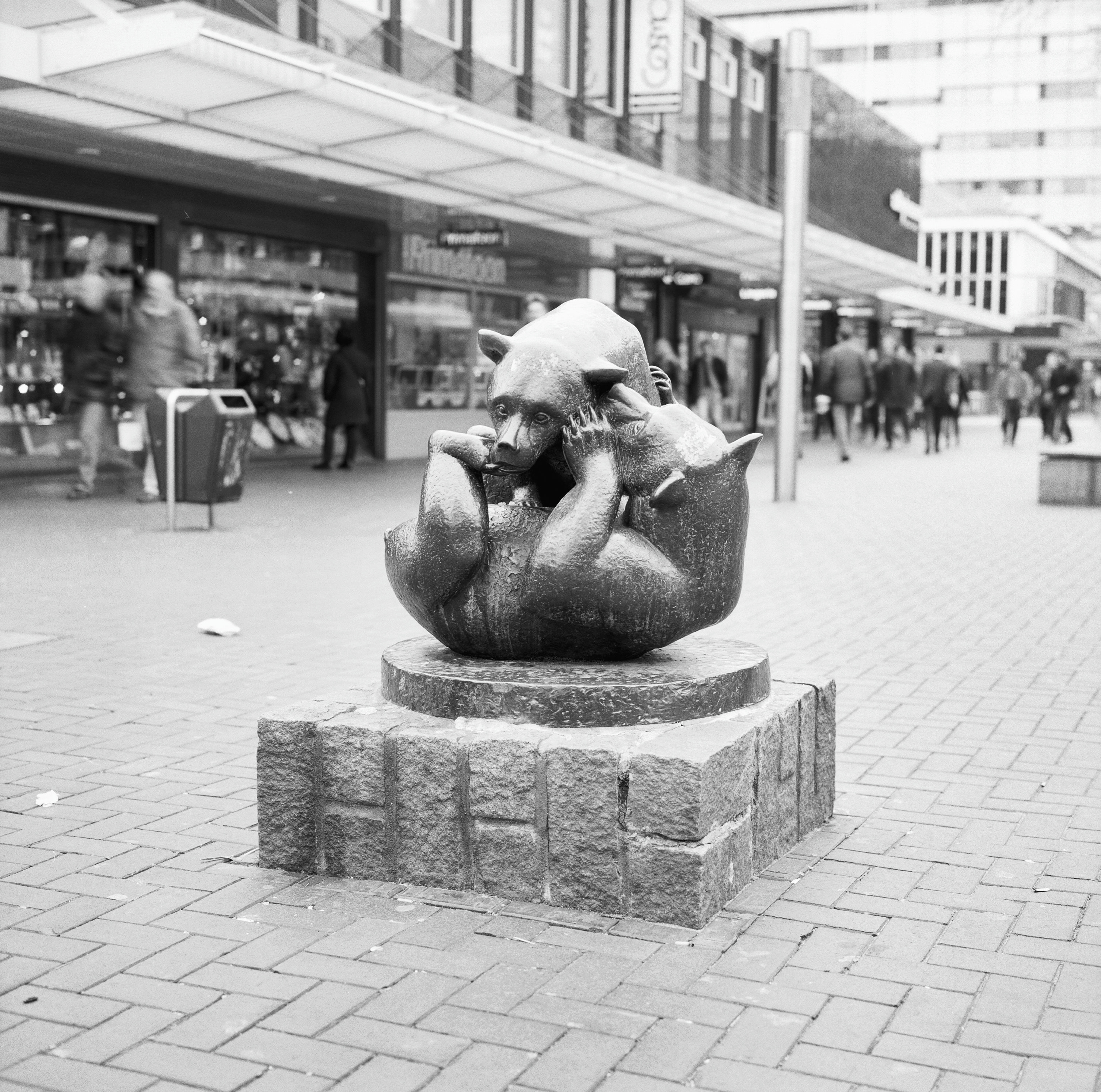 Beeld: Exterieur beeld van ijsberen